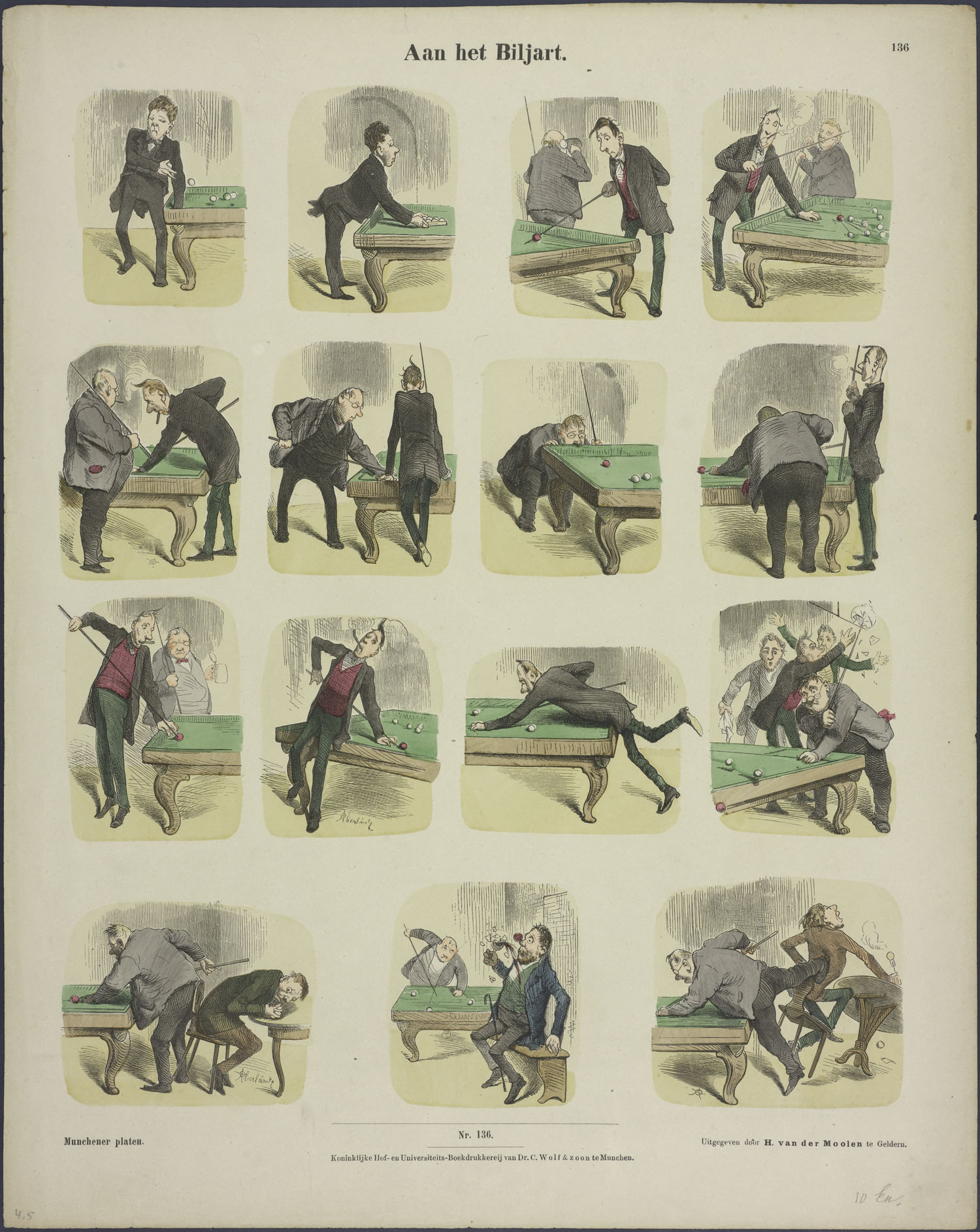 Centsprent met 4 rijen met 3 x 4 en 1 x 3 houtgravures, met een tekstloos (strip)verhaal over biljarters, die roken, drinken, rare houdingen aannemen, de bal raken en niet raken, een lamp laten sneuvelen en andere klanten aanstoten.